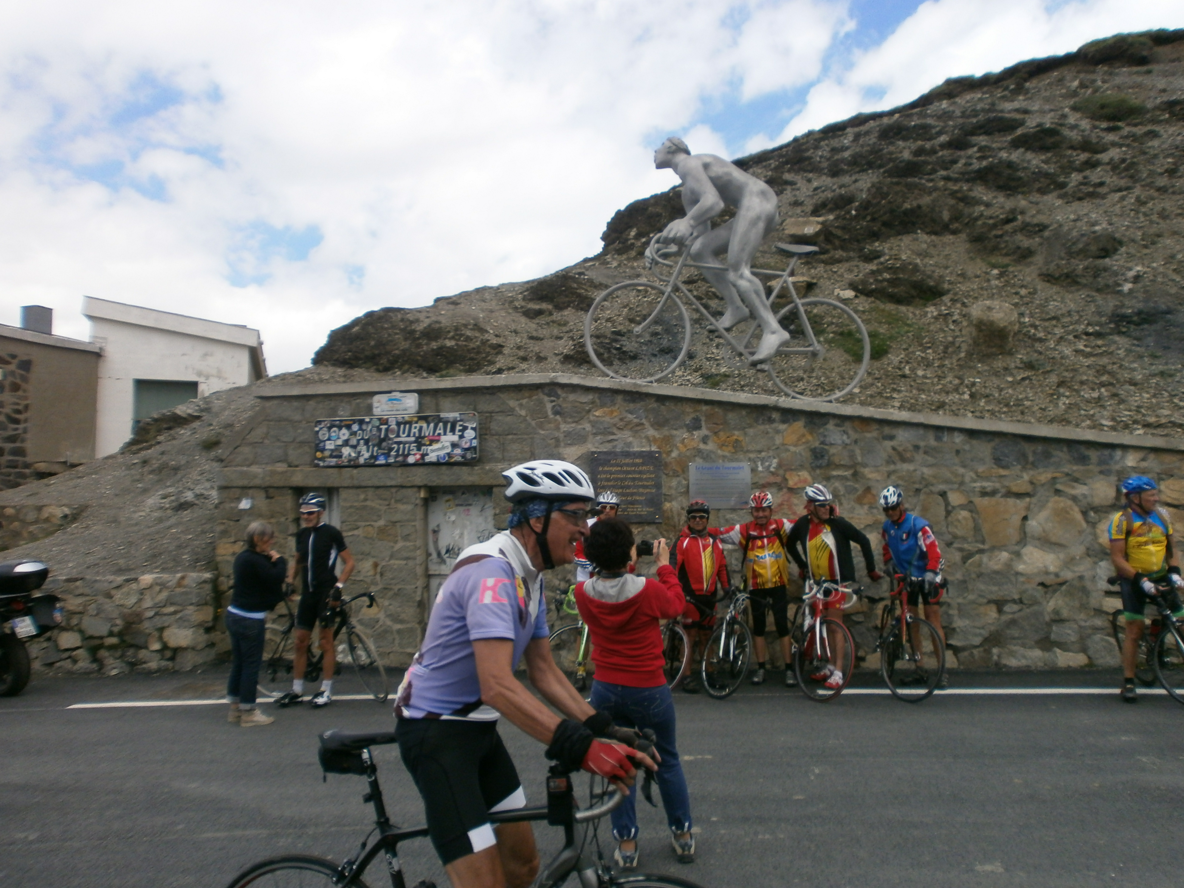 Cicloturismo-Col del Tourmalet-Francia